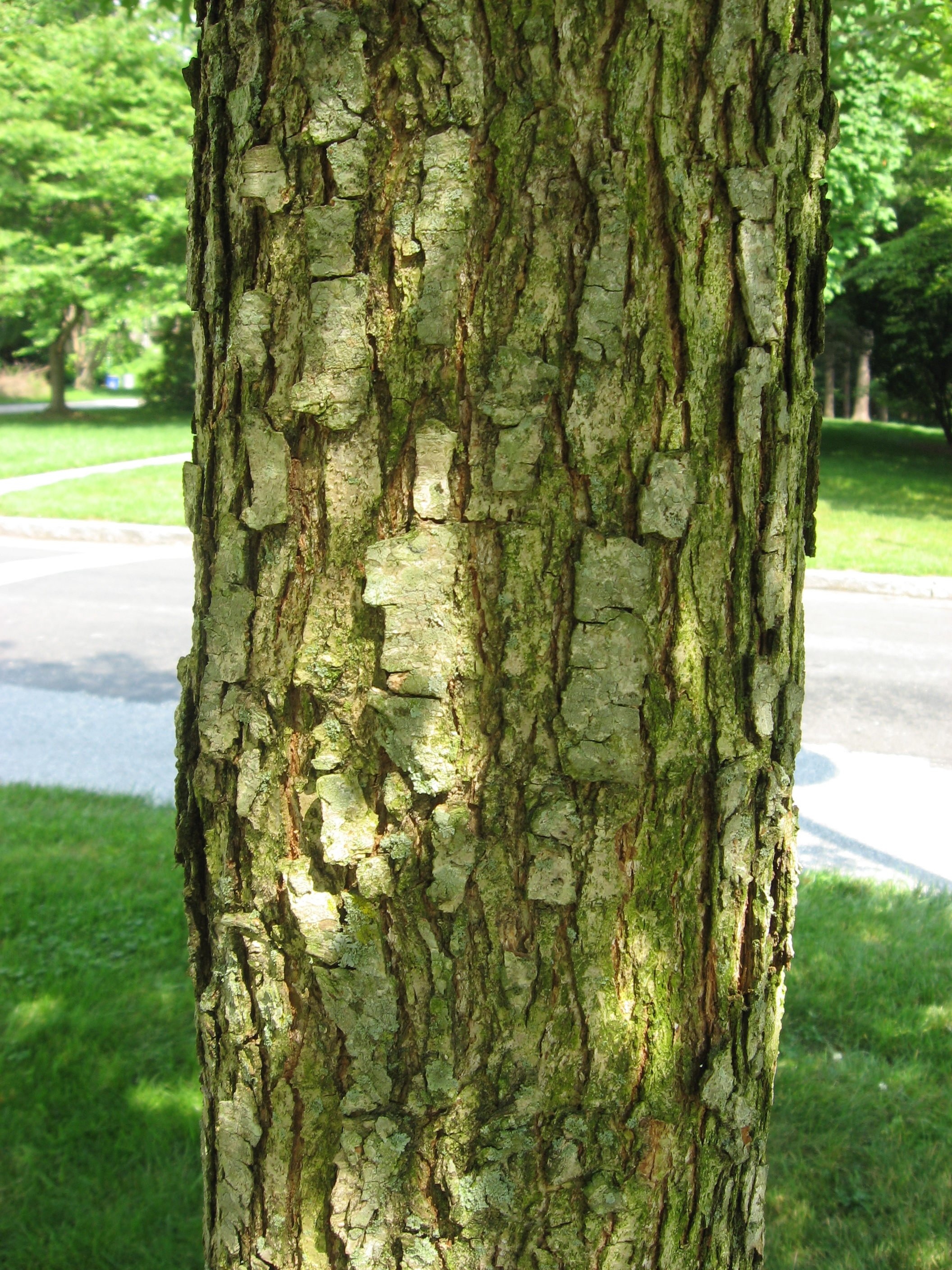 Vista de la corteza del Roble lyrata